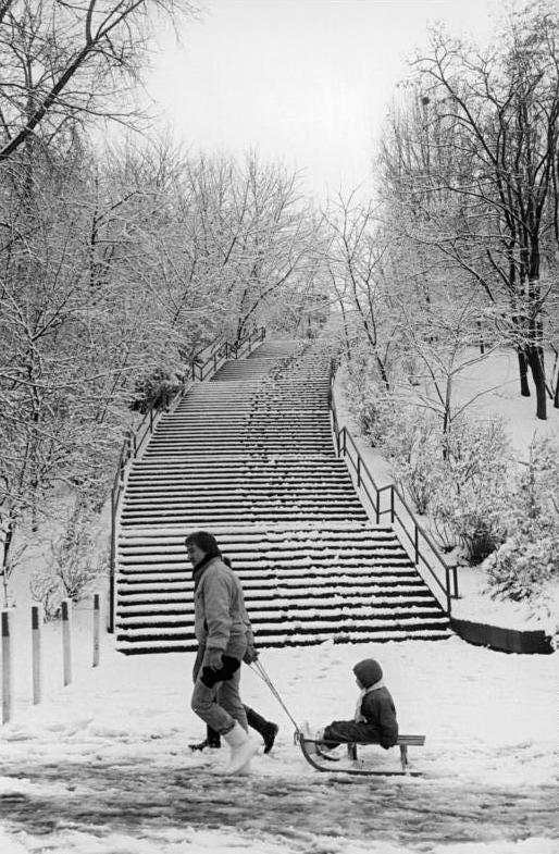 Berlin, Volkspark Friedrichhain, Winter ADN-ZB Uhlemann 8.3.88 Berlin: Rodelwetter-Auf dem Wege zur Schlittenfahrt im Volkspark Friedrichshain.